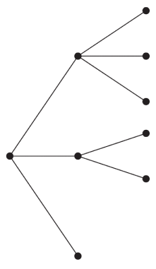 Zuhaitz horizontala finitu